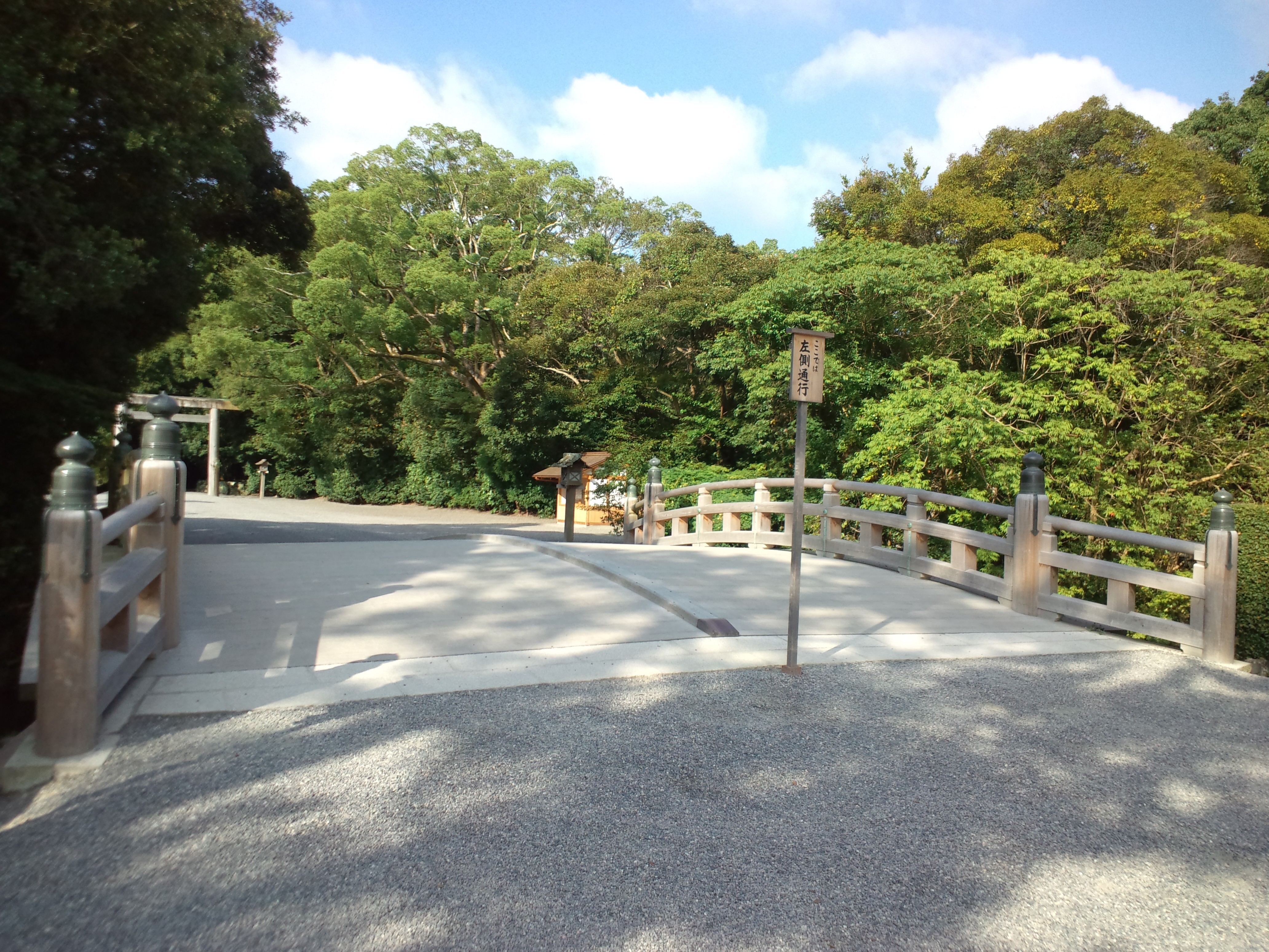 伊勢神宮 外宮 表参道火除橋